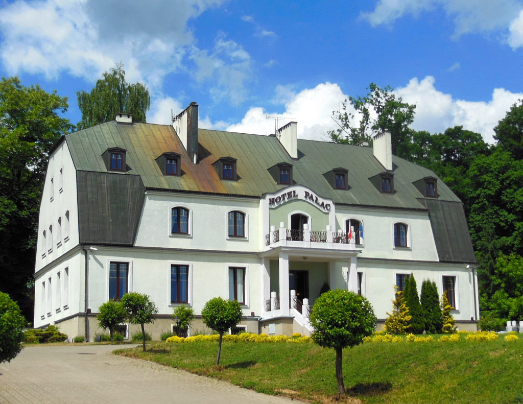 Hotel Pałac w Bydgoszczy na terenie Leśnego Parku Kultury i Wypoczynku